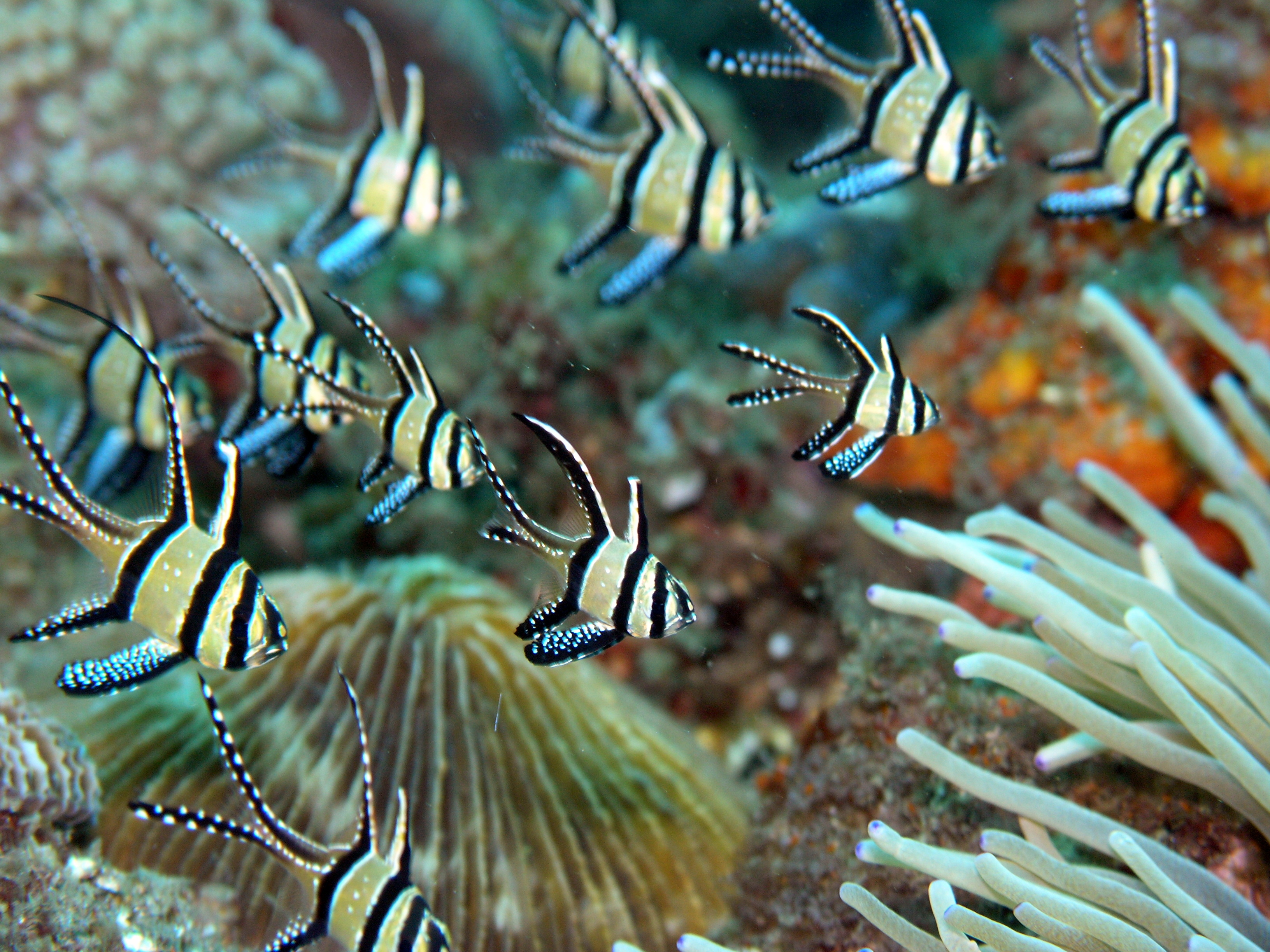 Image of a Banggai cardinalfish. Pterapogon kauderni. Taken at Lembeh Straits, North Sulawesi, Indonesia.